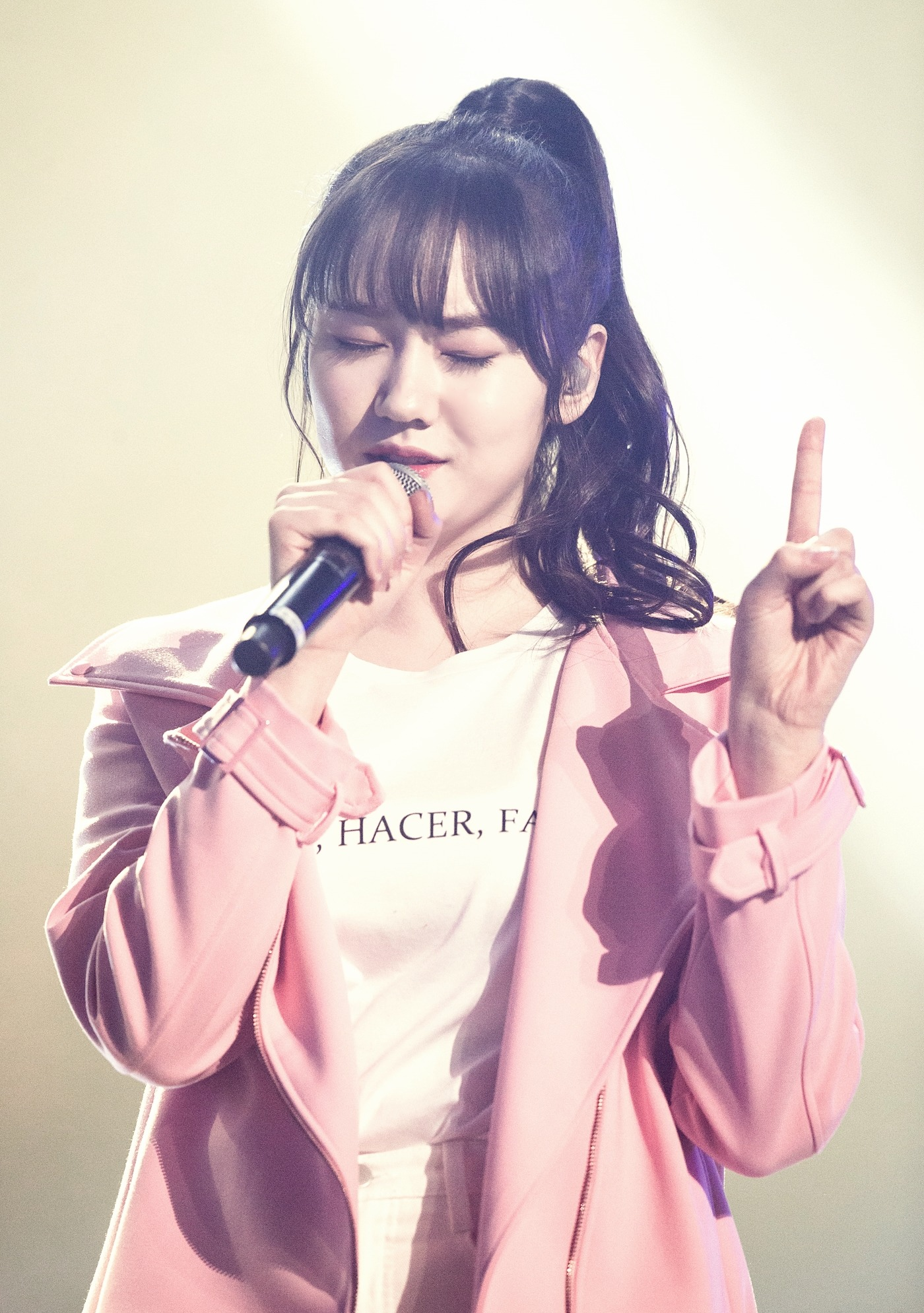 조선말: 170106 BYE & HI 콘서트 프리스틴